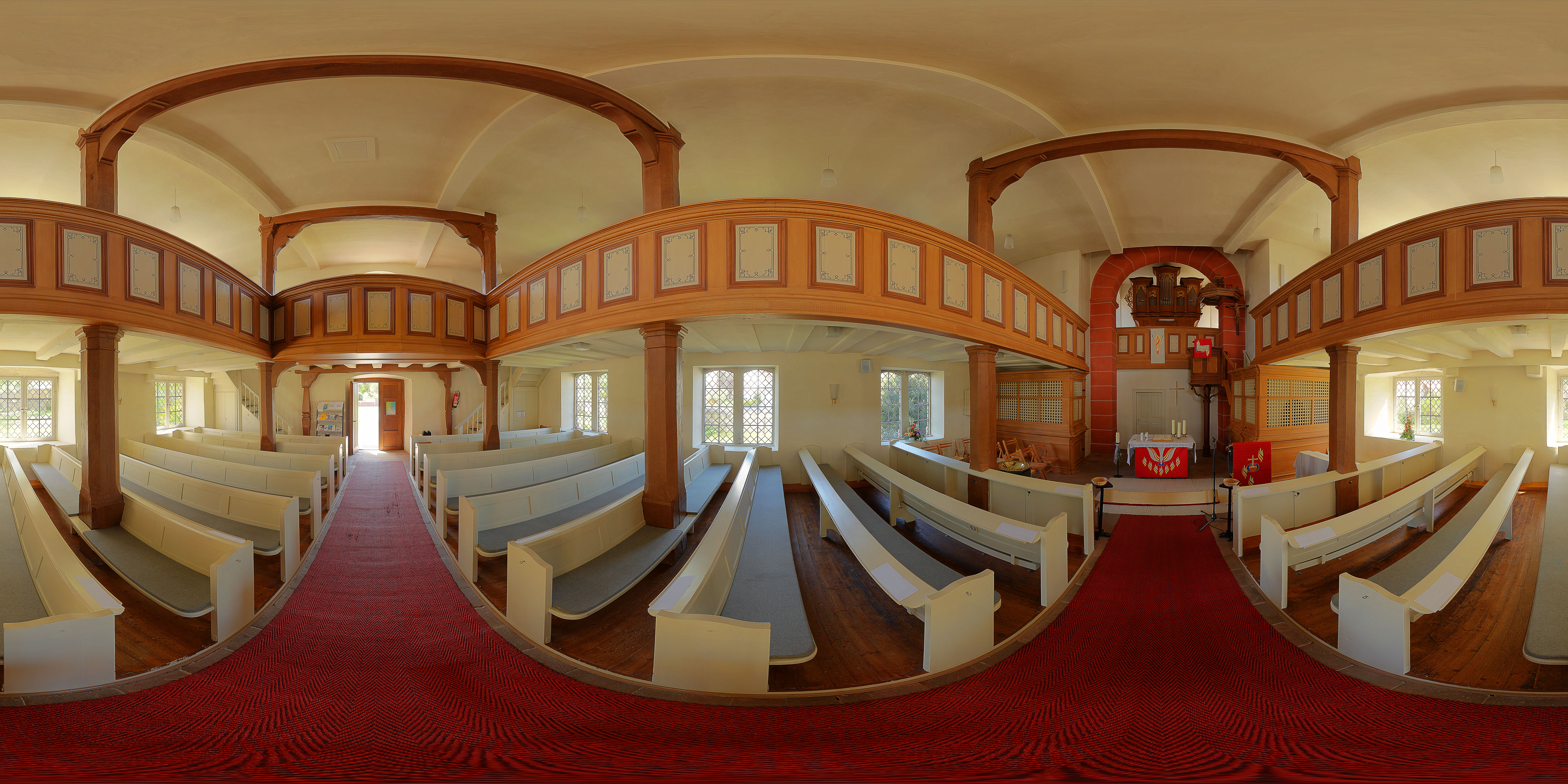 Evangelische Kirche in Trais-Horloff, Hungen, Landkreis Gießen, Hessen, Deutschland